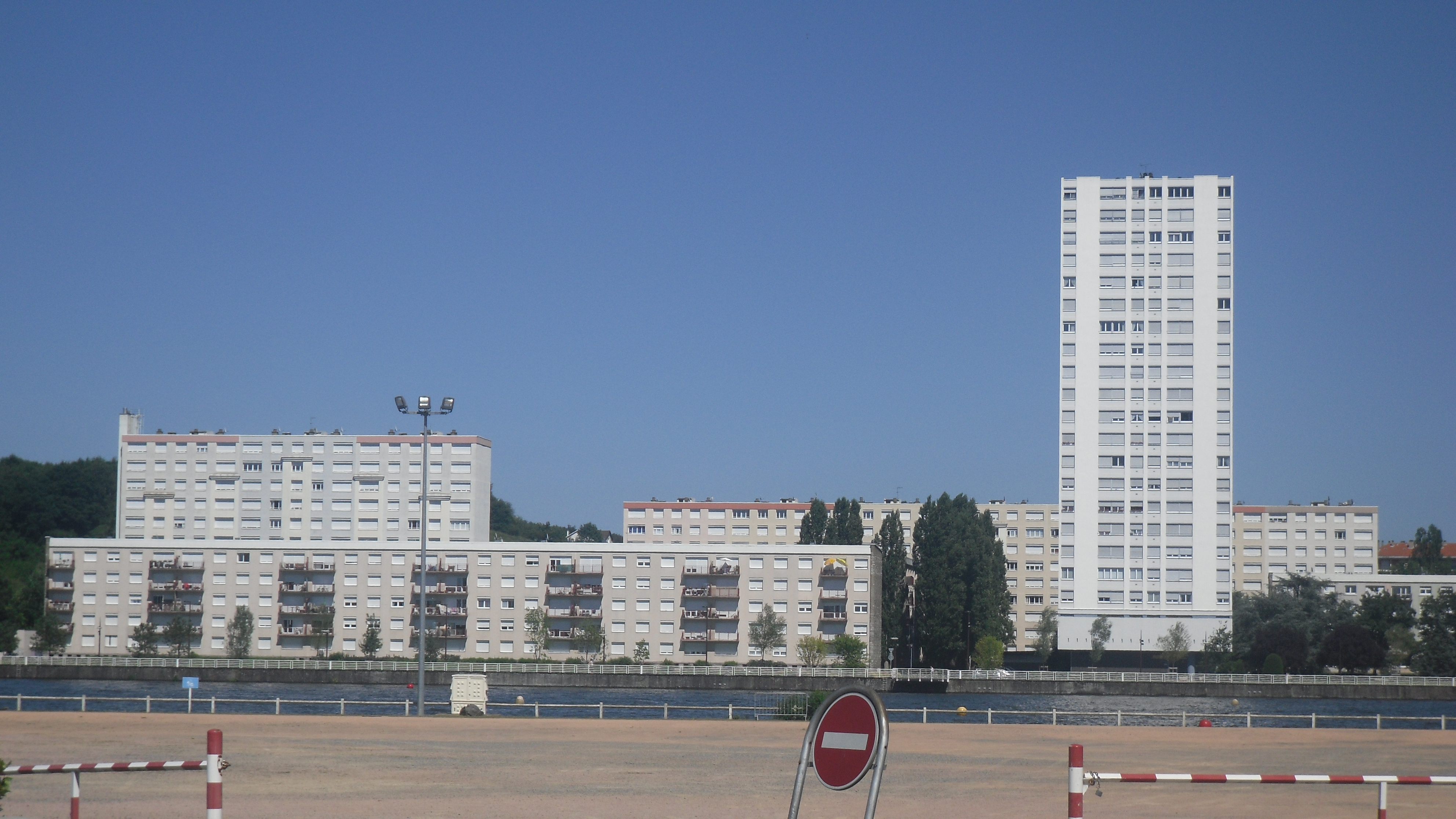 Cité des Ailes depuis le centre omnisports.